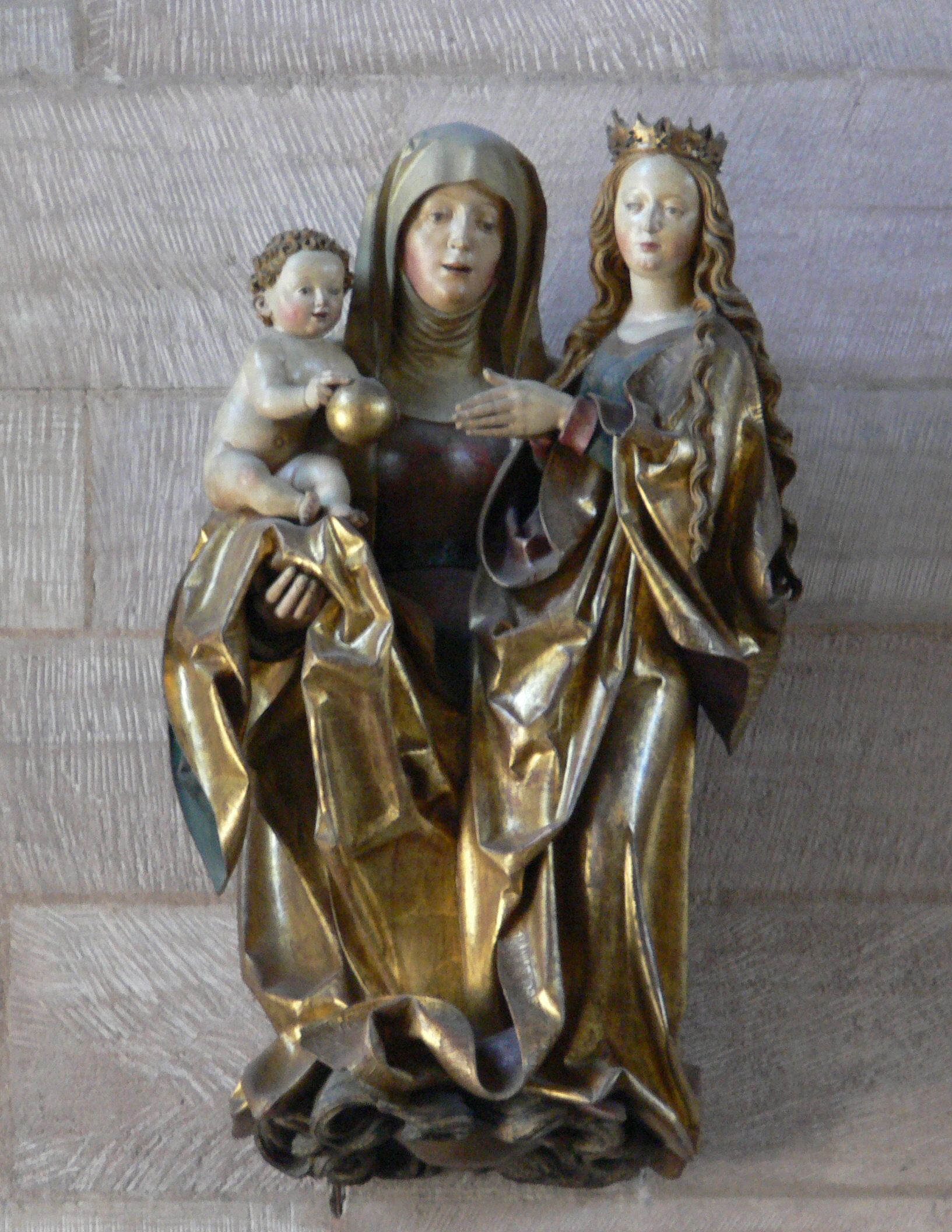 Nürnberg, Kirche St. Jakob Veit Stoß: Hl. Anna selbdritt, Lindenholz, vergoldet; um 1500/1505; früher in der Frauenkirche, nach 1945 im Germanischen Nationalmusem, seit 1963 in St. Jakob